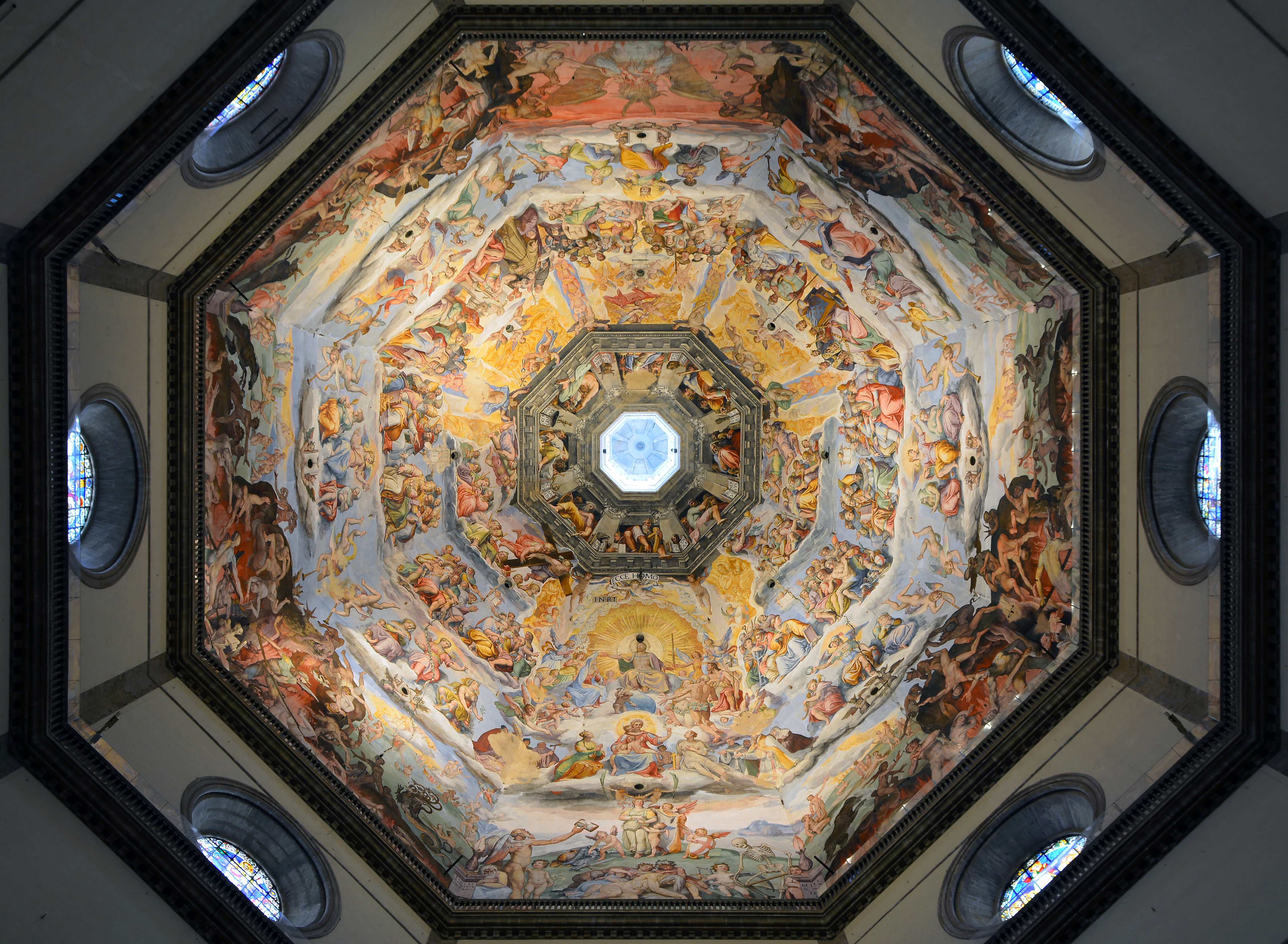 Dome of Cattedrale di Santa Maria del Fiore (Florence)